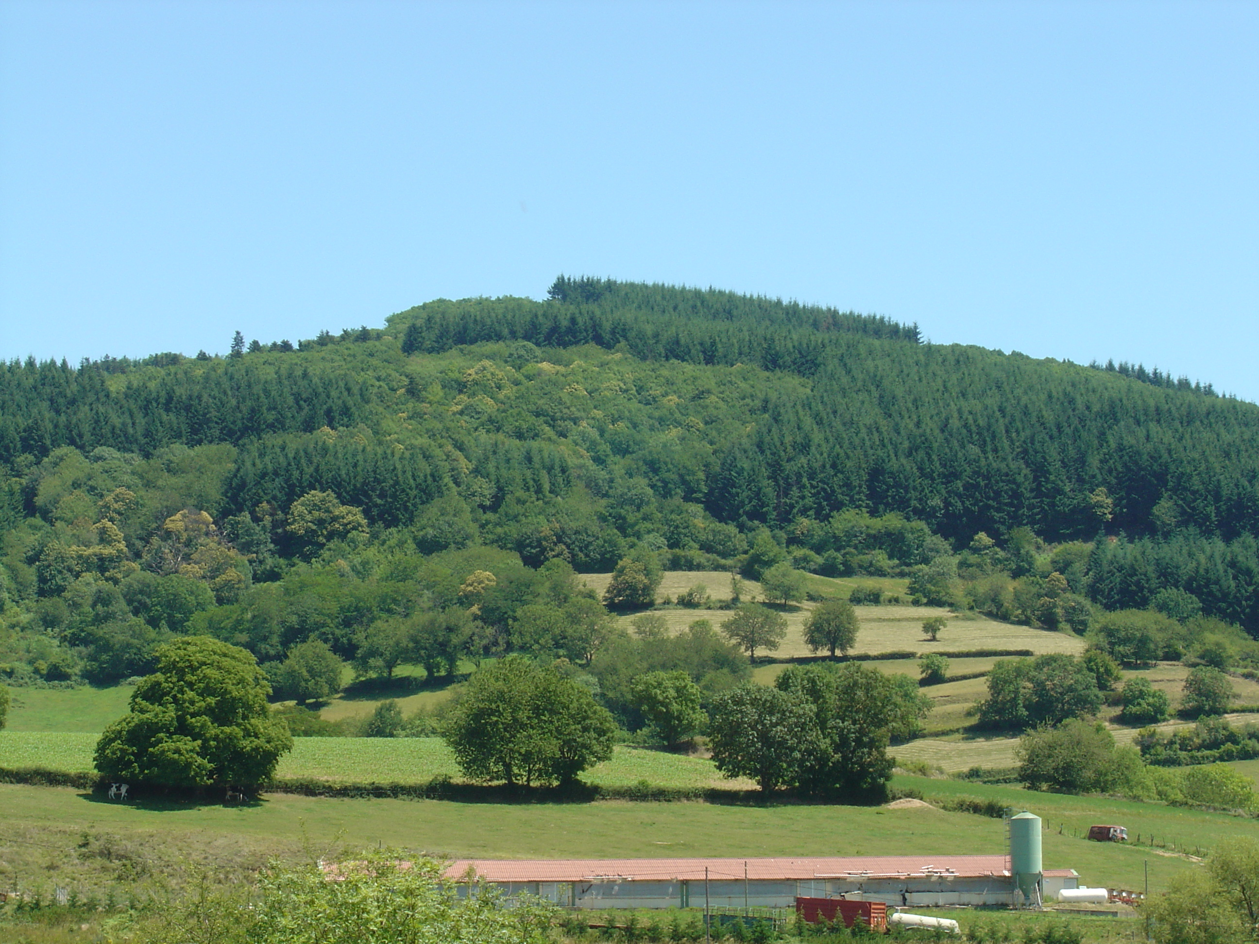 Le Signal de la Mère Boîtier, point culminant des monts du Mâconnais, vu à proximité de Tramayes